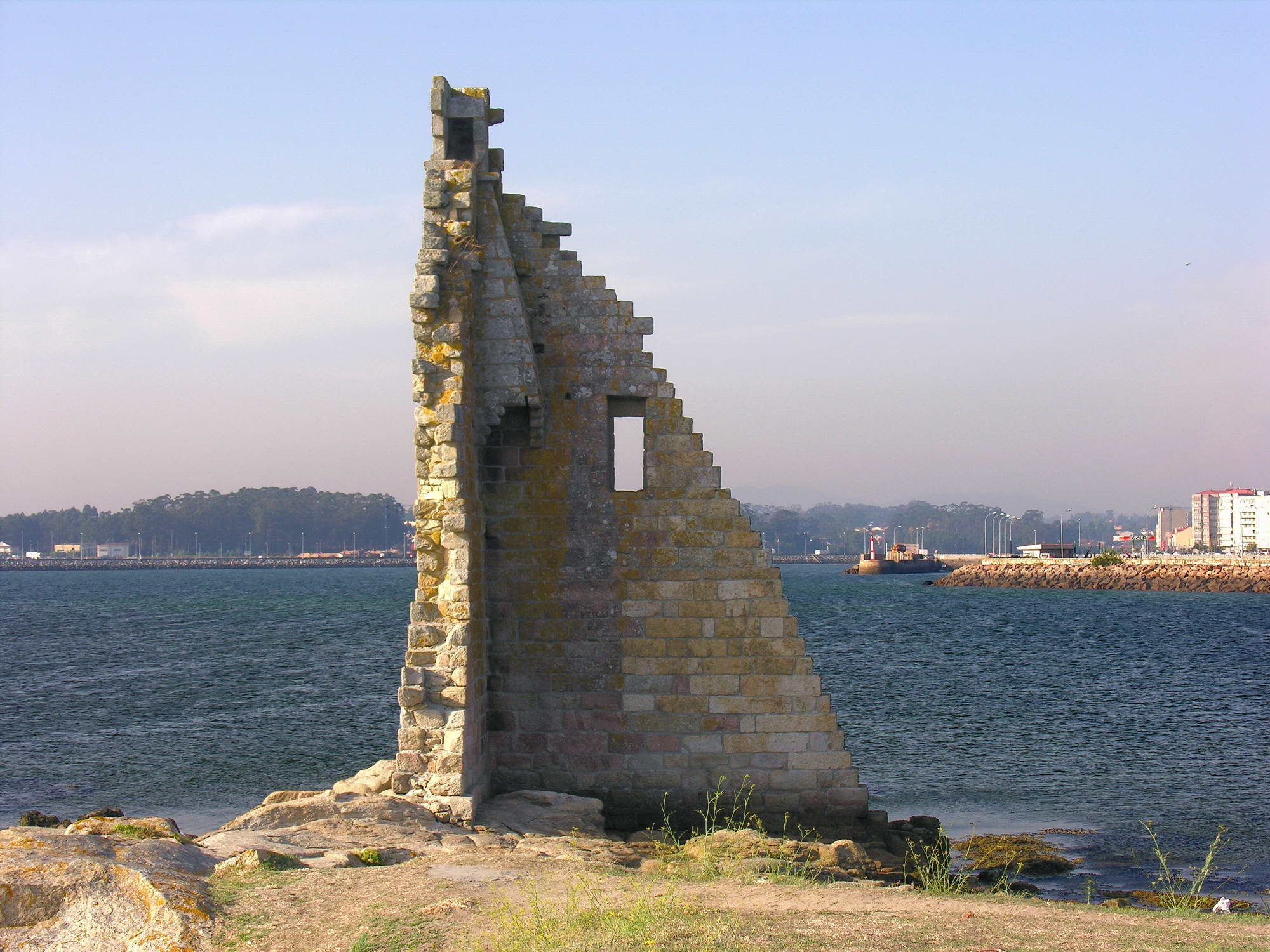 Ría de Arousa, Cambados, Galicia, España Publish by= Luis Miguel Bugallo Sánchez. Self made.